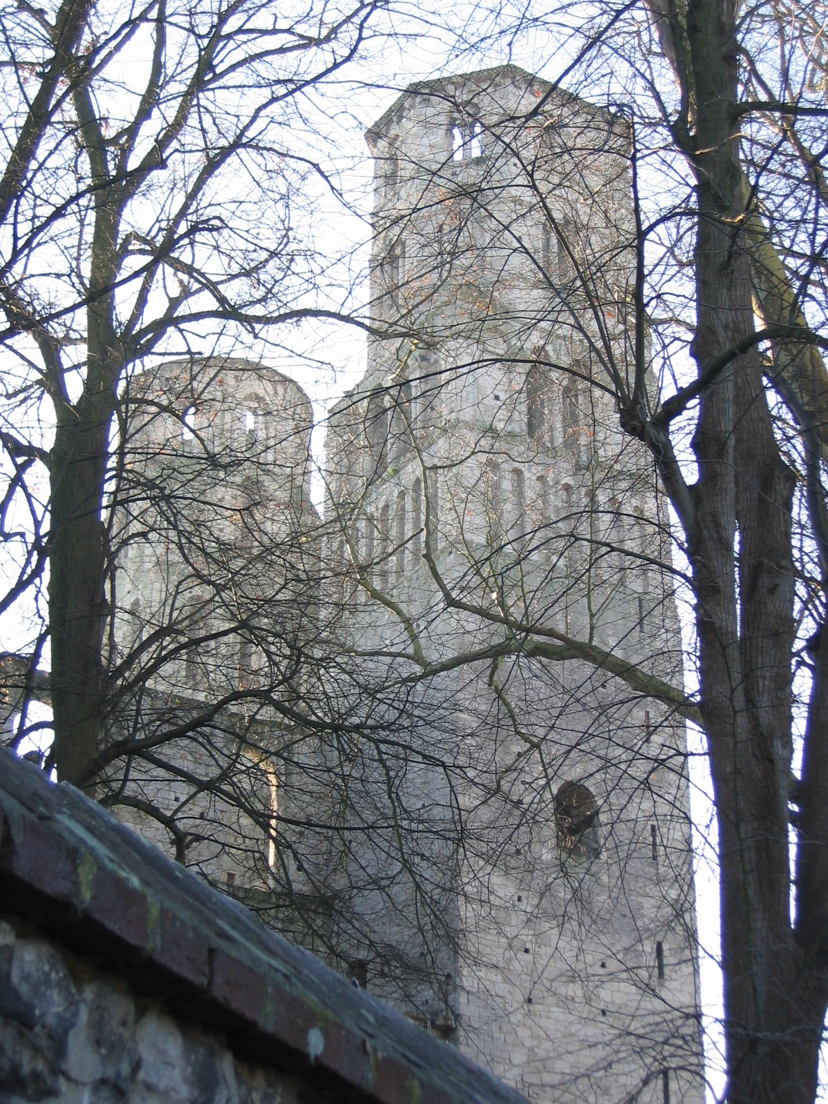 Tours de l'abbatiale de Jumièges